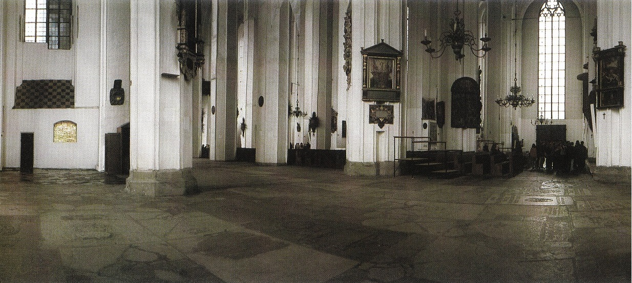 Eric Mayen, niger et aurum, Bazylika Mariacka w Gdańsku